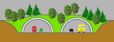 Grünbrücke